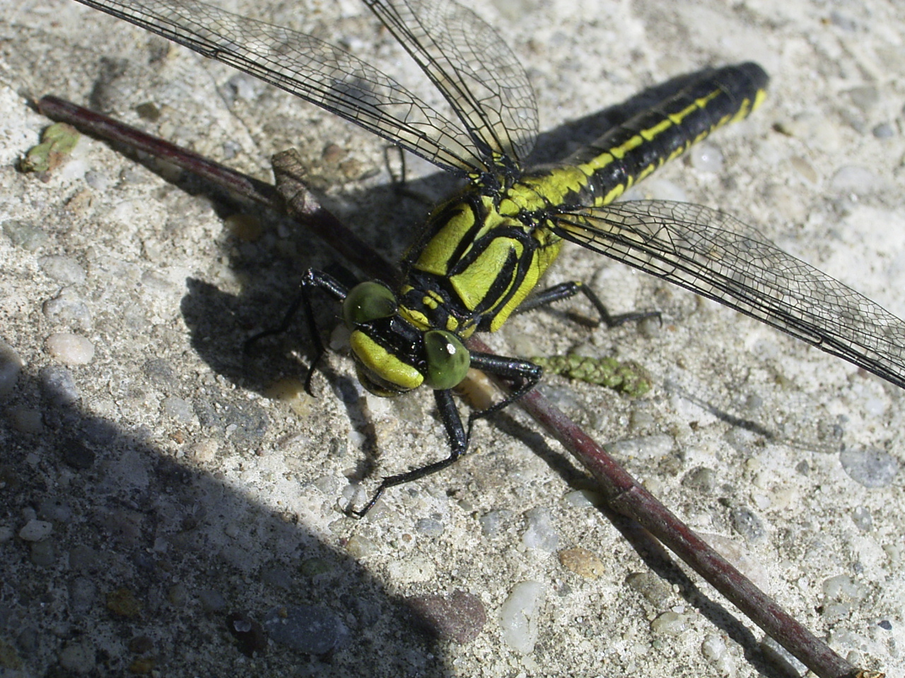 Nahaufnahme einer Gomphus vulgatissimus